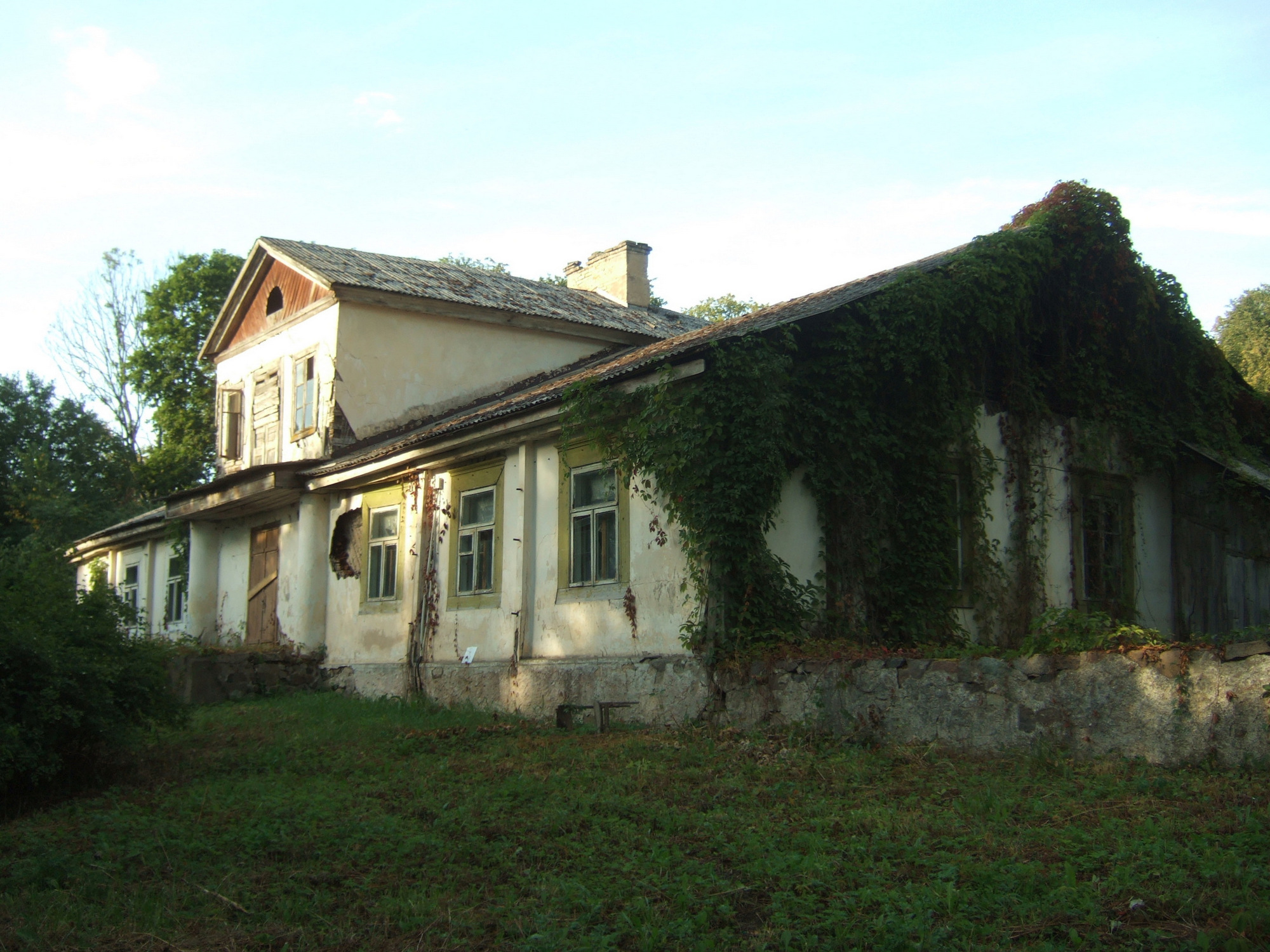 Mozūriškių dvaro rūmai